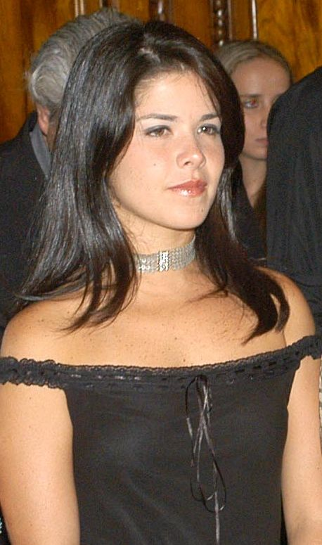 A atriz brasileira Samara Felippo, a partir de foto de um grupo tomada no Festival de Gramado, 2005